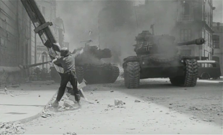 Screenshot di Le quattro giornate di Napoli ( 1962) di Nanni Loy